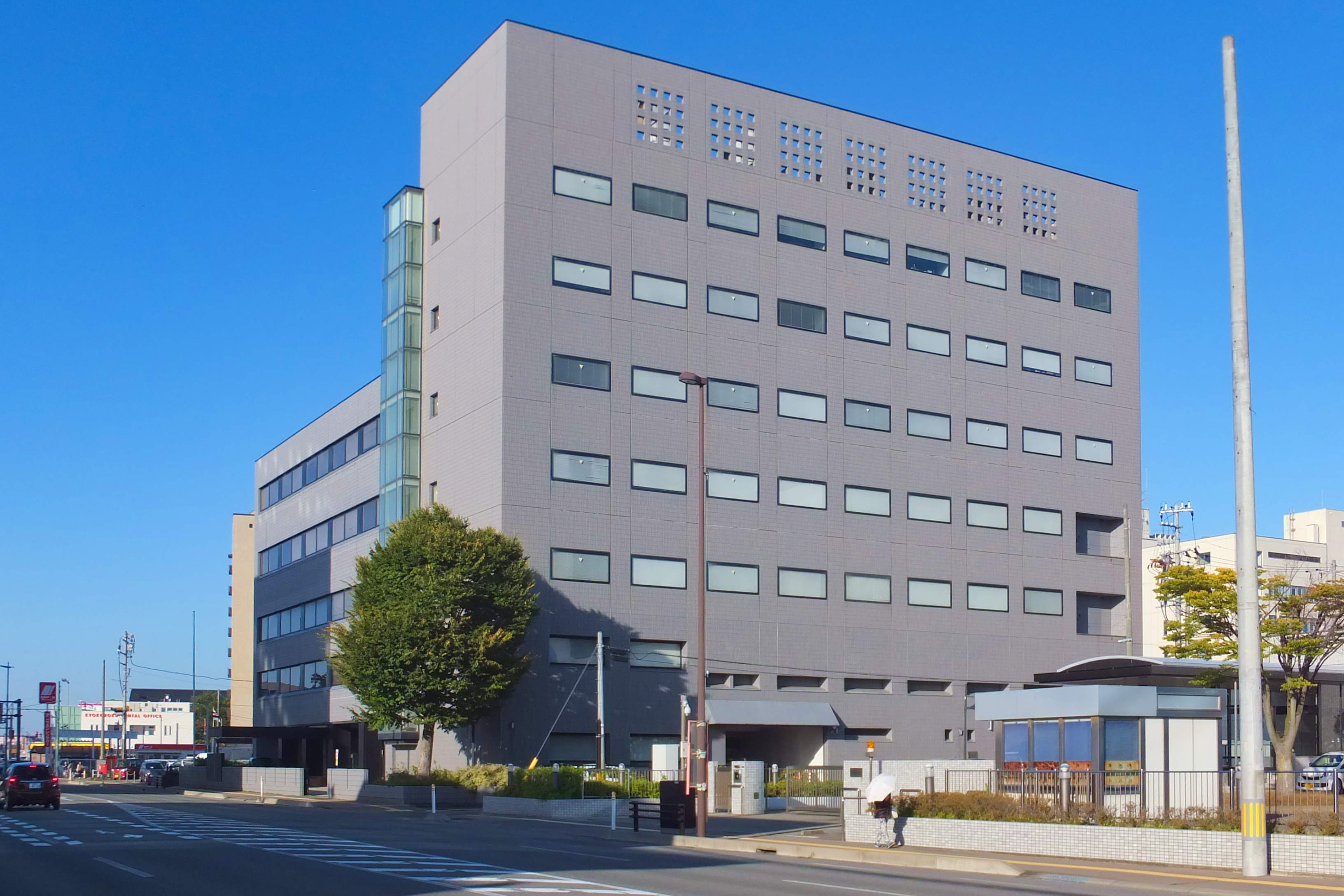 秋田銀行事務統括部（秋田市旭北錦町）